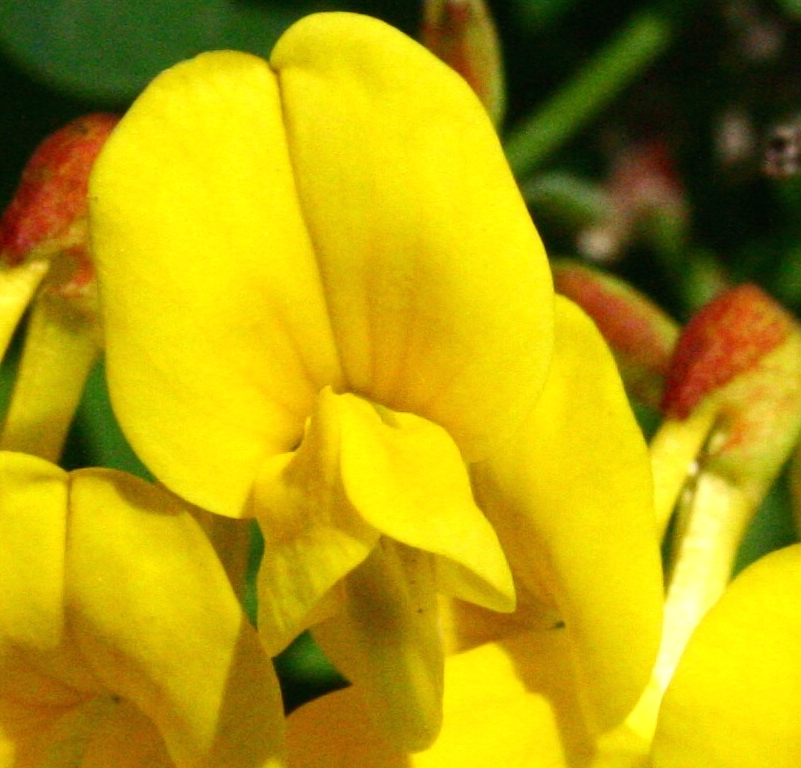 Coronilla_coronata (Cornetta coronata) Località : Pasa, Sedico (BL), 356 m s.l.m.